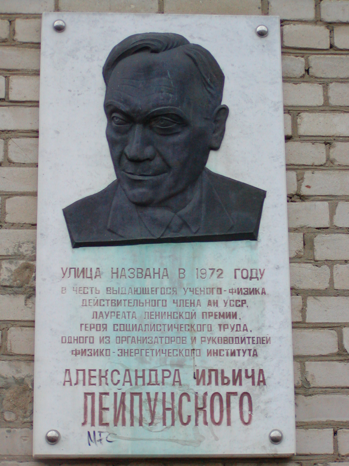 Мемориальная доска в честь Александра Ильича Лейпунског на улице Лейпунского в Обнинске со следами вандализма.